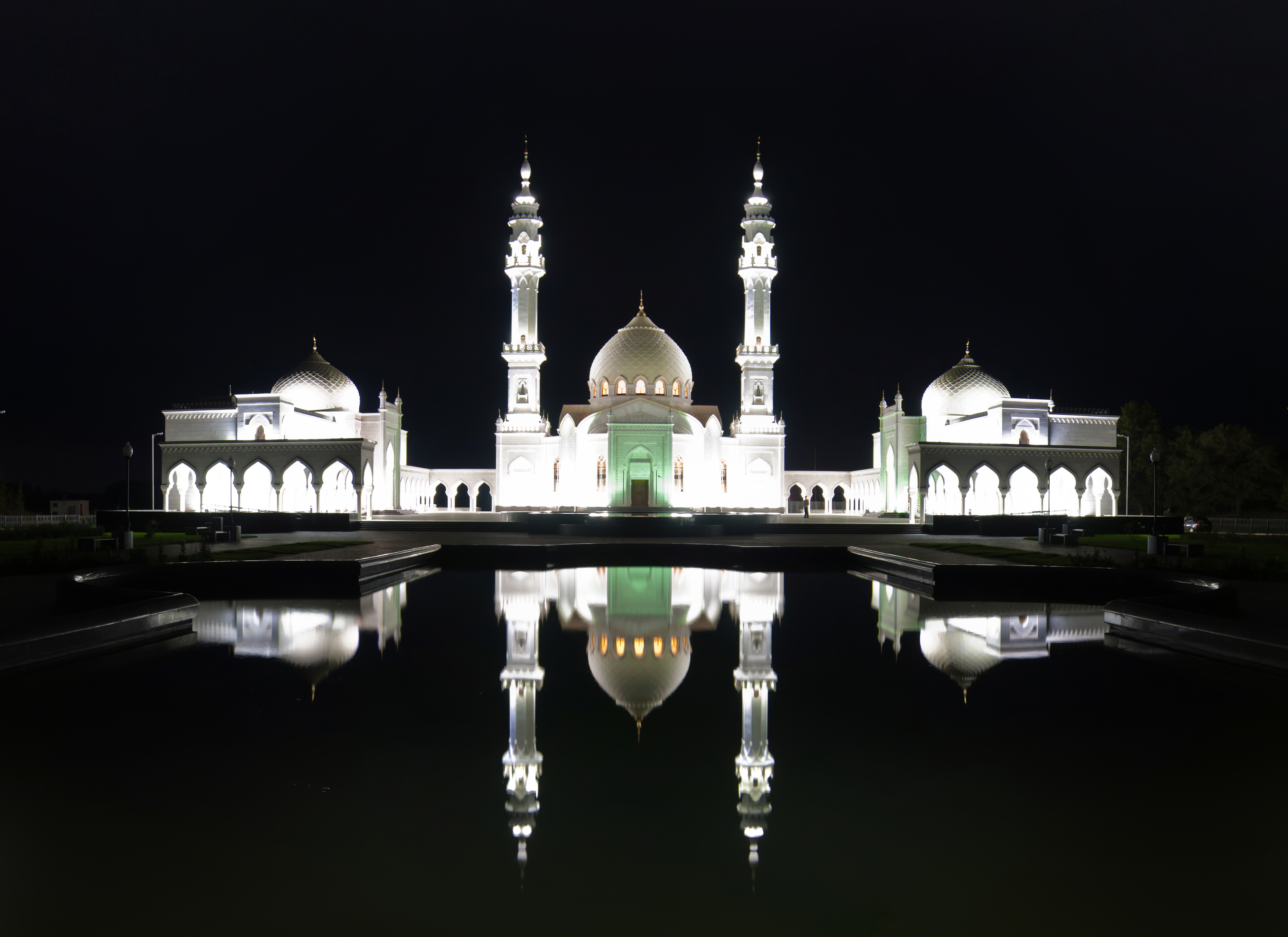 Городище Великие Булгары, Спасский район This image is related to the protected area of Russia number 1600162